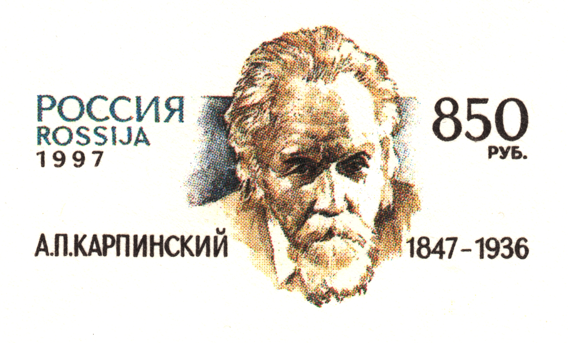 Марка к 150-летию А.П. Карпинского